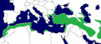 Areale Testudo graeca